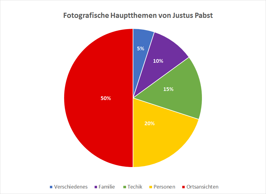 Zeigt die Anteile in Prozent der fotografischen Haupthemen von Justus Pabst